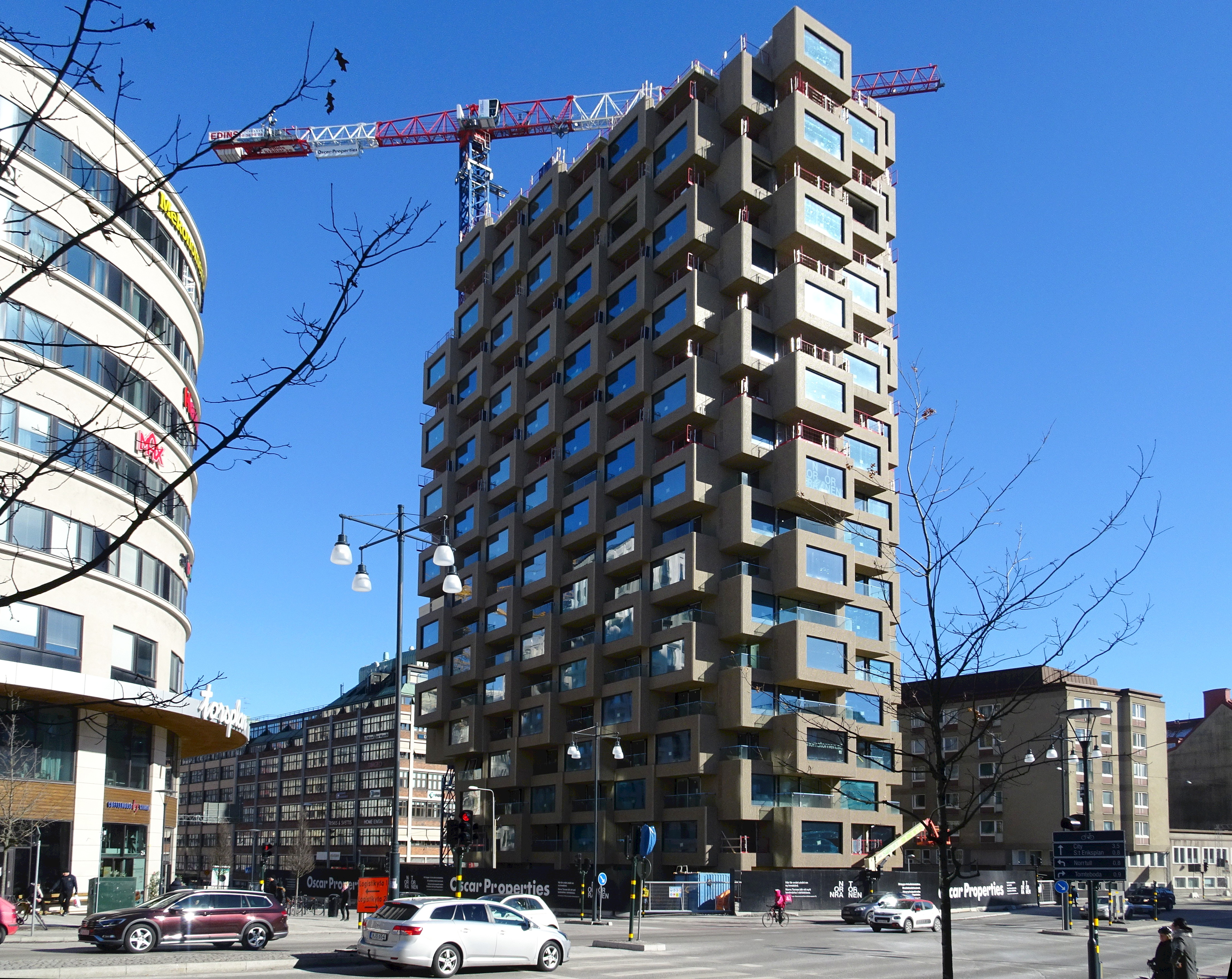 Norra Tornen under uppförande, här det östra av de båda tornen.